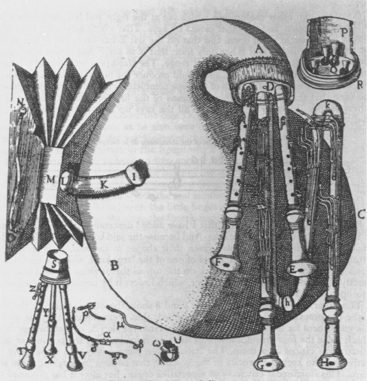 Dessin d'une sourdeline (sorte de cornemuse) tirée de L'Harmonie Universelle de Marin Mersenne (17e siècle)